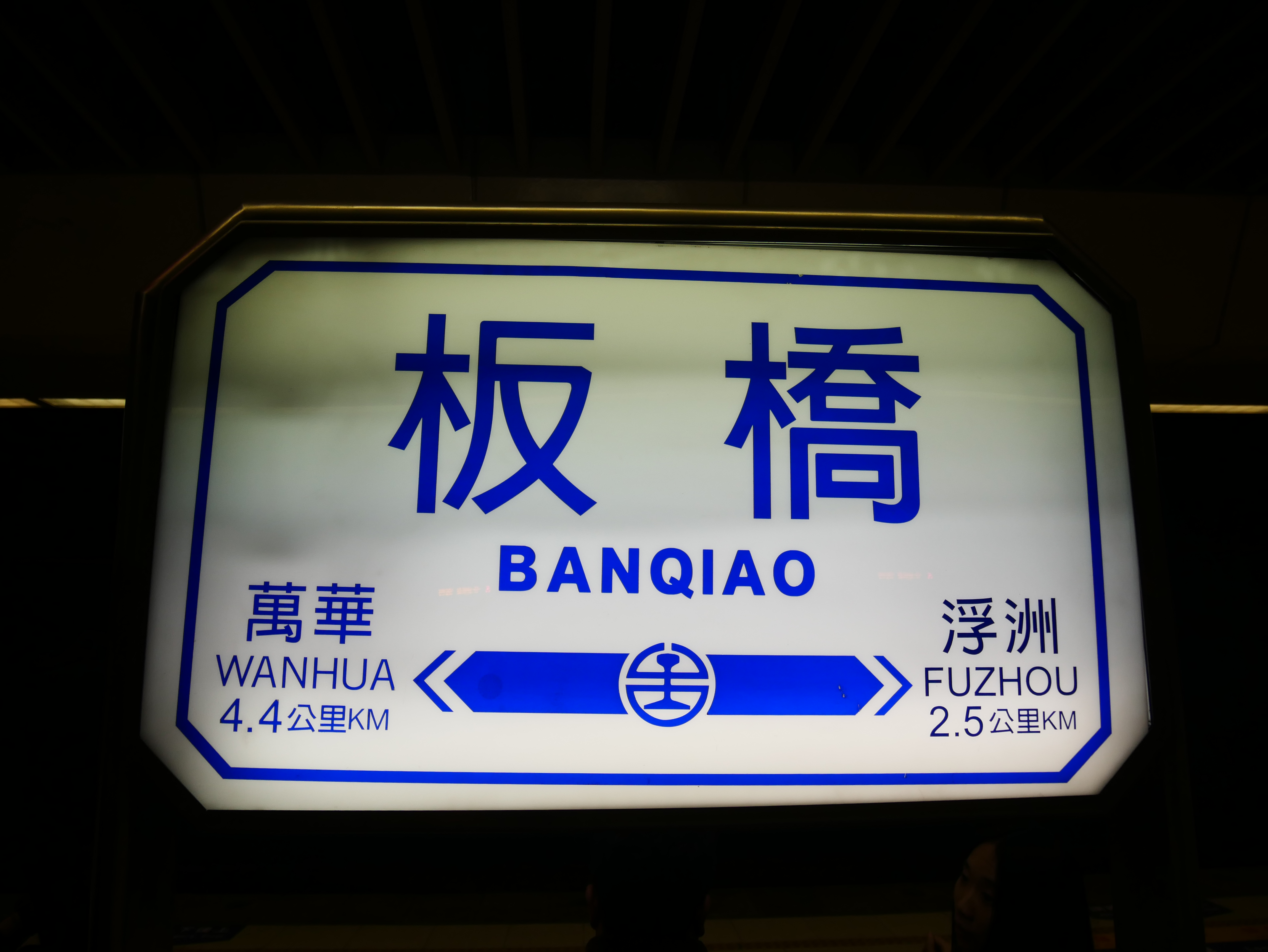 臺鐵板橋車站站名牌，新北市板橋區新埔聯合里新民里